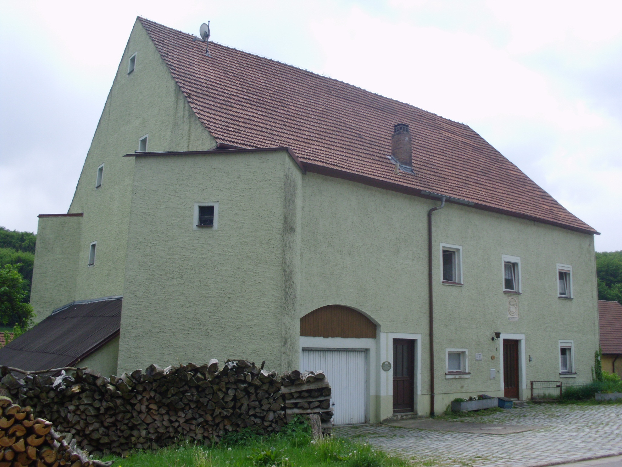 Falbenthal, Ortsteil der mittelfränkischen Stadt Treuchtlingen im Landkreis Weißenburg-Gunzenhausen (Bayern), das ehemalige Schloss